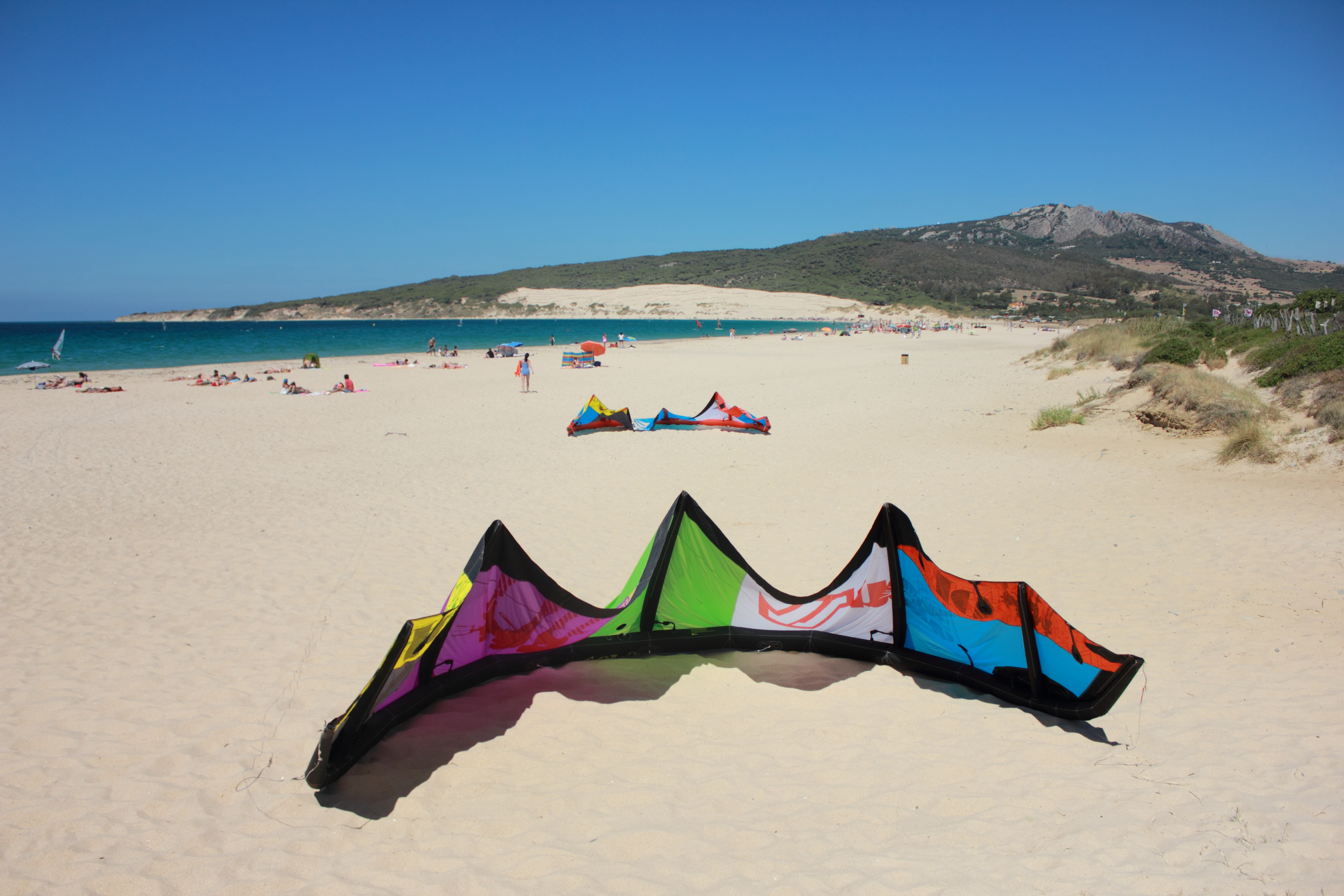 Playa virgen de Valdevaqueros, paraiso del Kite Surf